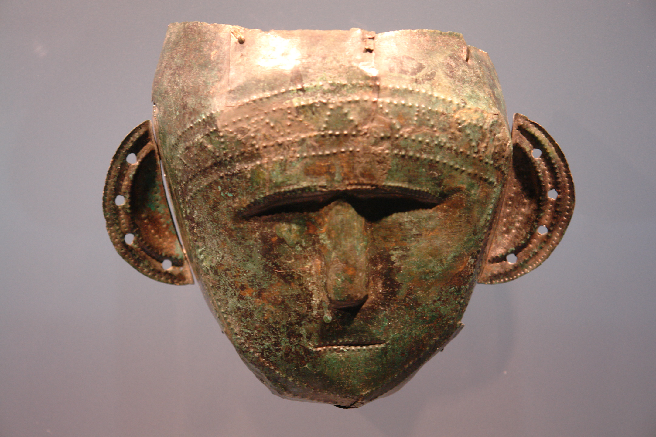 Blechmaske Kleinklein Großklein